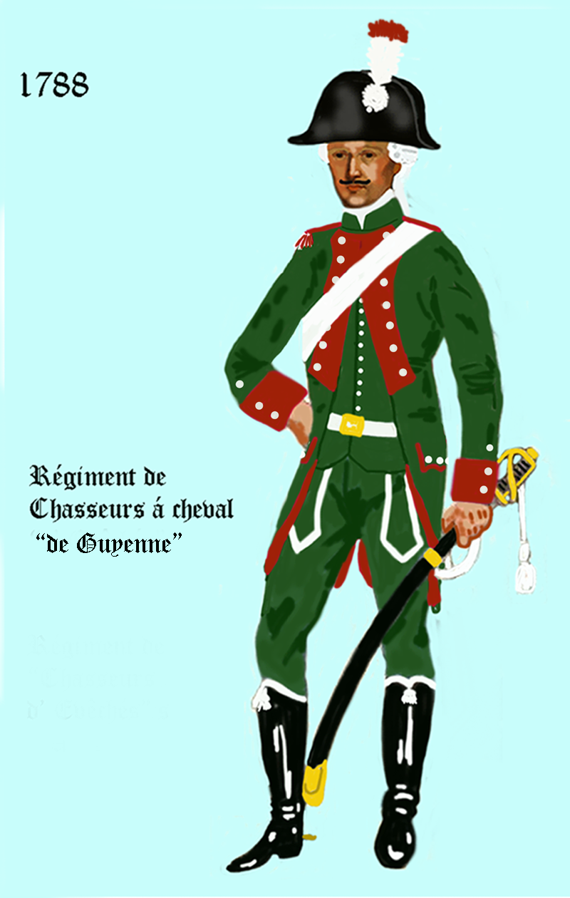 l'uniforme du régiment Chasseurs à cheval "de Guyenne" de 1788